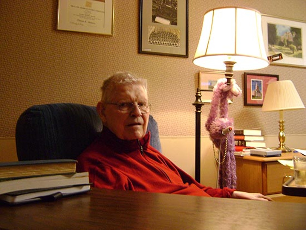 Doutor em História Moderna Europeia pela Universidade Harvard em 1960, Skidmore viajou ao Brasil no ano seguinte, dias após a renúncia de Jânio Quadros, para passar três anos de pesquisa com bolsa de pós-doutorado. No período no país, aproximou-se de políticos, intelectuais e jornalistas, como Francisco de Assis Barbosa (1914-1991), San Tiago Dantas (1911-1964), Fernando Gasparian (1930-2006) e Caio Prado Júnior (1907-1990)